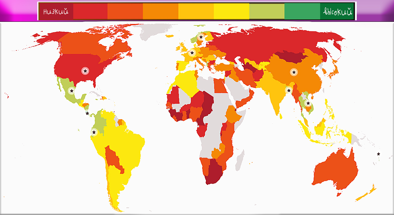 Мировой индекс счастья, составляемый проектом